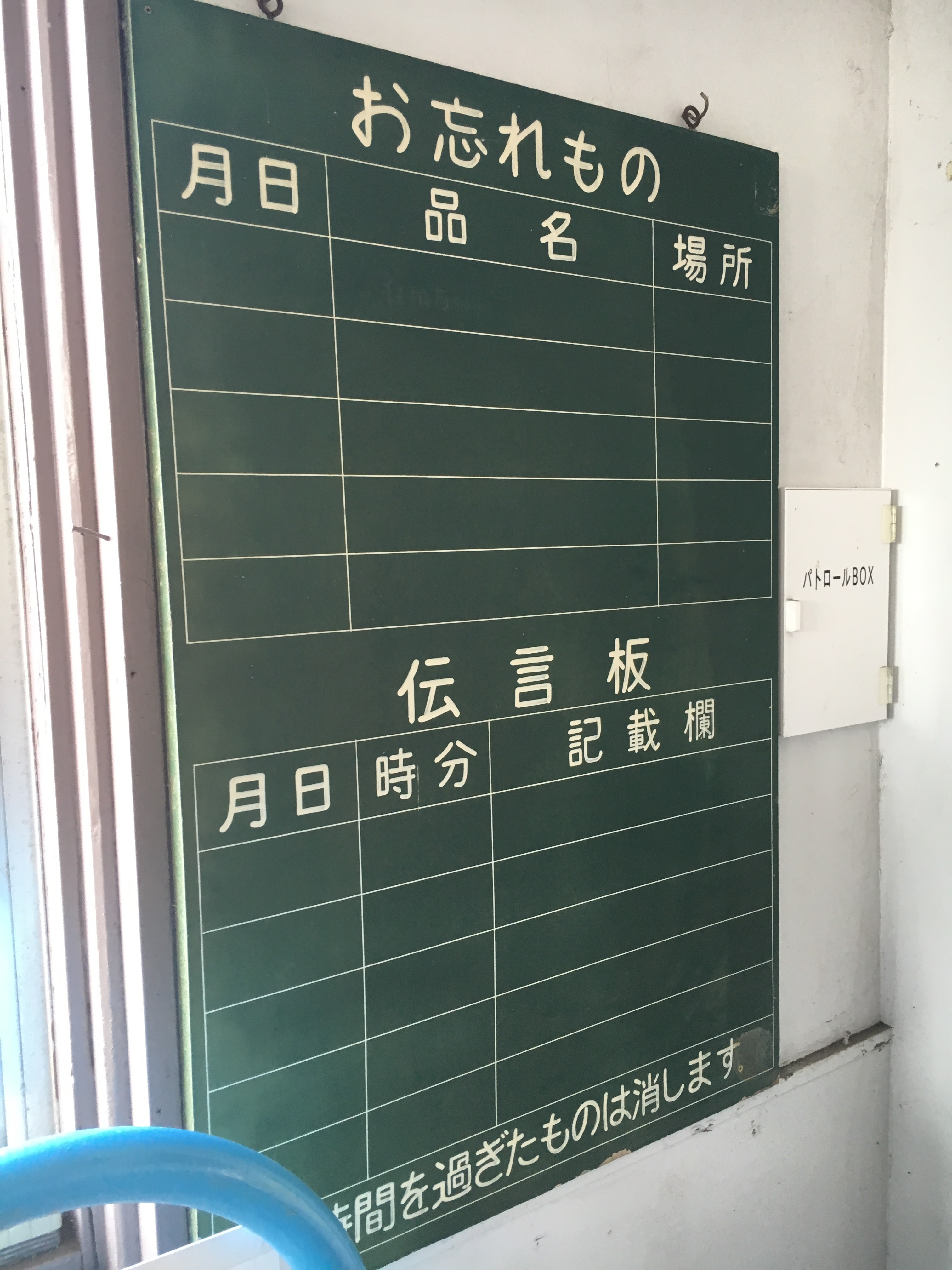 名鉄吉良吉田駅の忘れ物告知欄もある伝言板